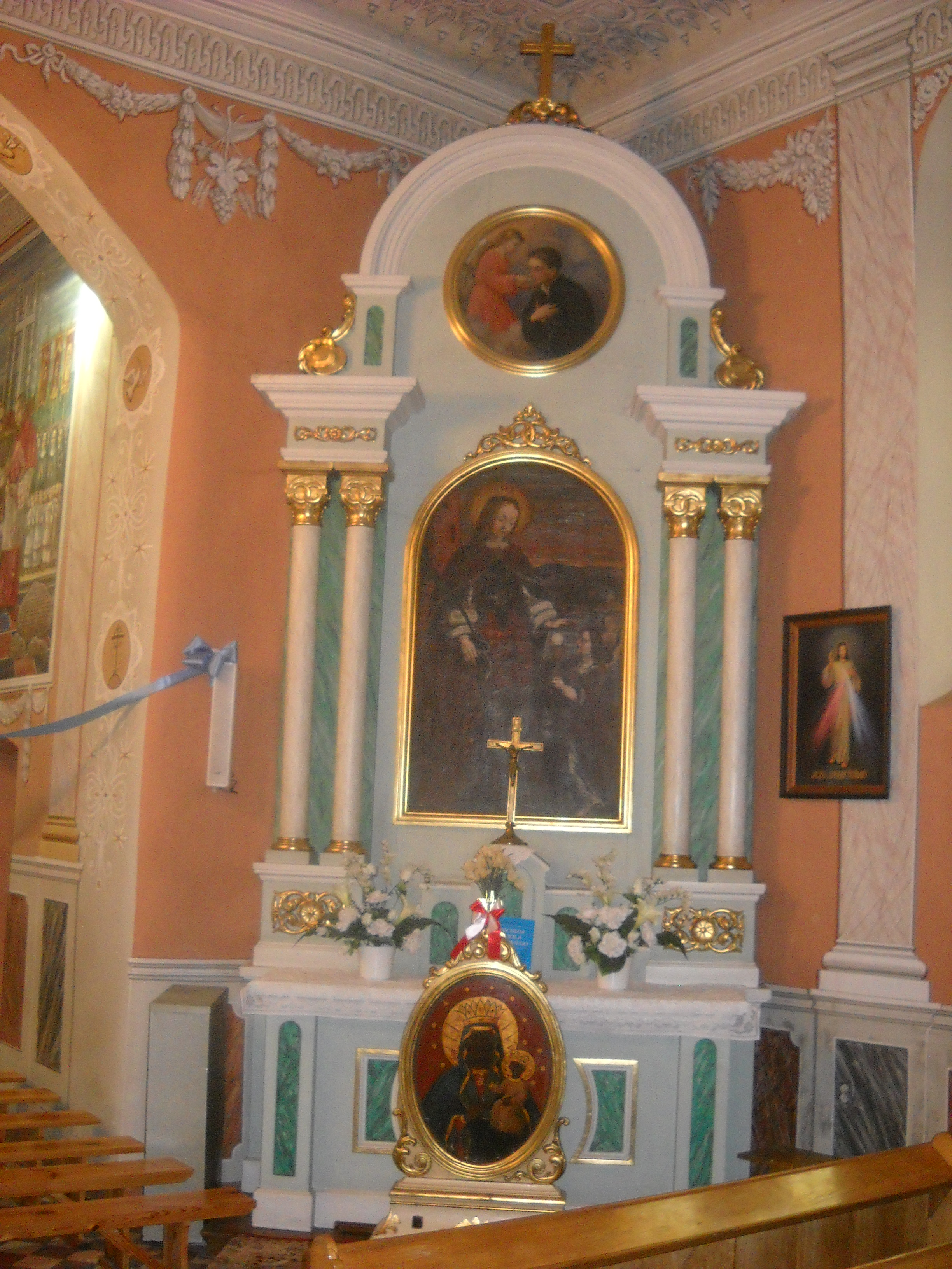 Wąsosze - rzymskokatolicki kościół parafialny pw. Wszystkich Świętych, ołtarz boczny św.Barbary